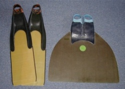 monopale et bi palmes en fibres de verre